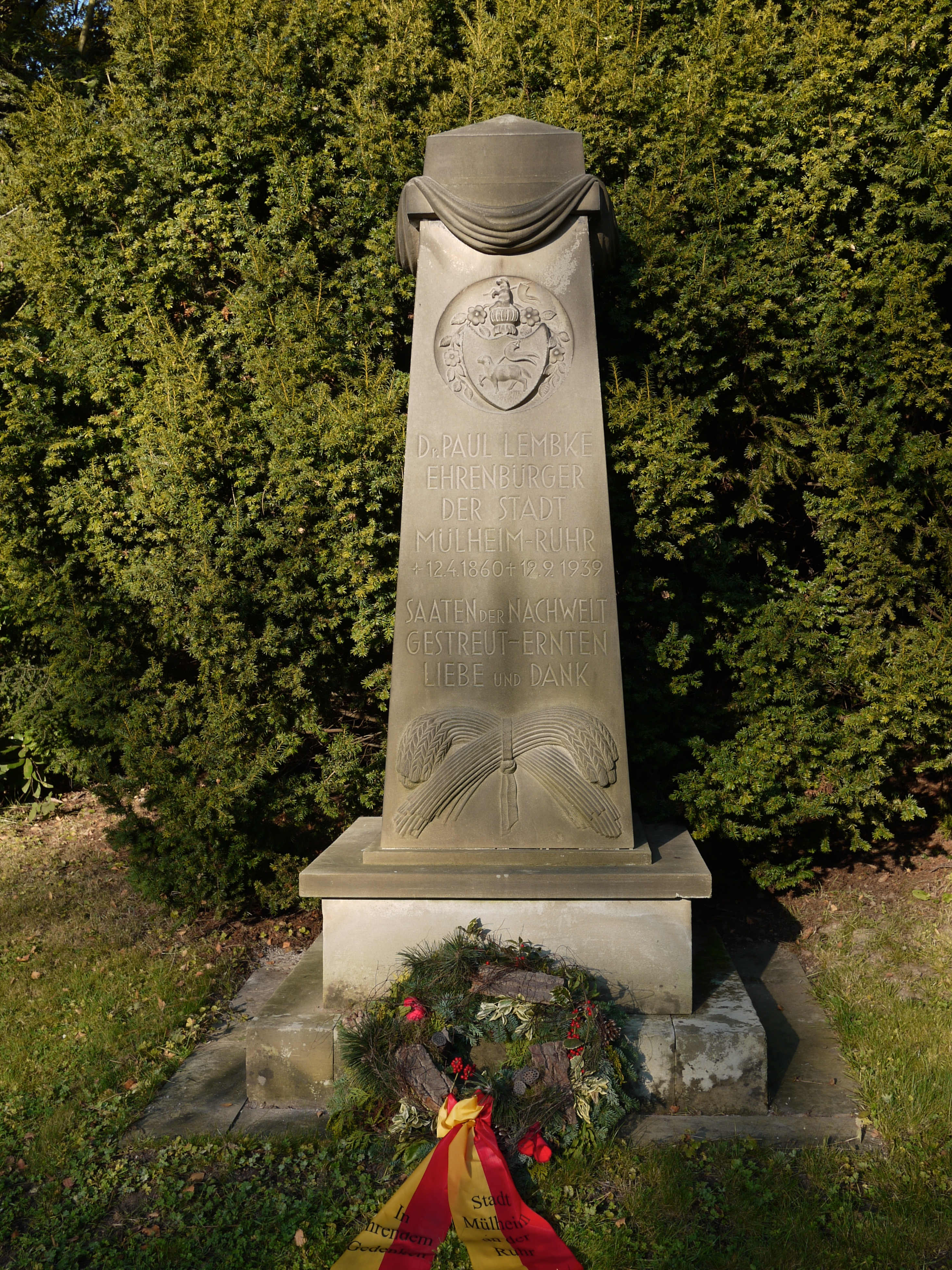 Haupttfriedhof in Mülheim an der Ruhr, Grabstätte Lembke